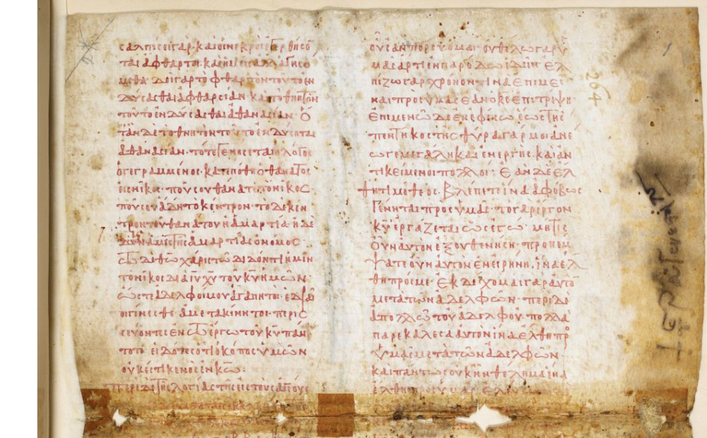 UNcial 0121 (Gregory-Aland) with text of 1 Corinthians 15:52-58; 2 Cor 1:1; 1:6-13